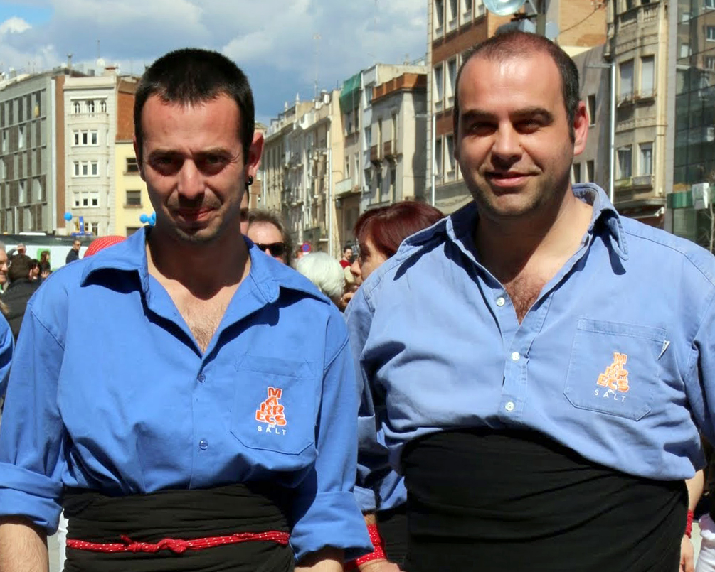 Aram Martí (esquerra) i Sebastià Morató (dreta). Cap de colla i president dels Marrecs de Salt (2015) en una actuació a Sabadell.